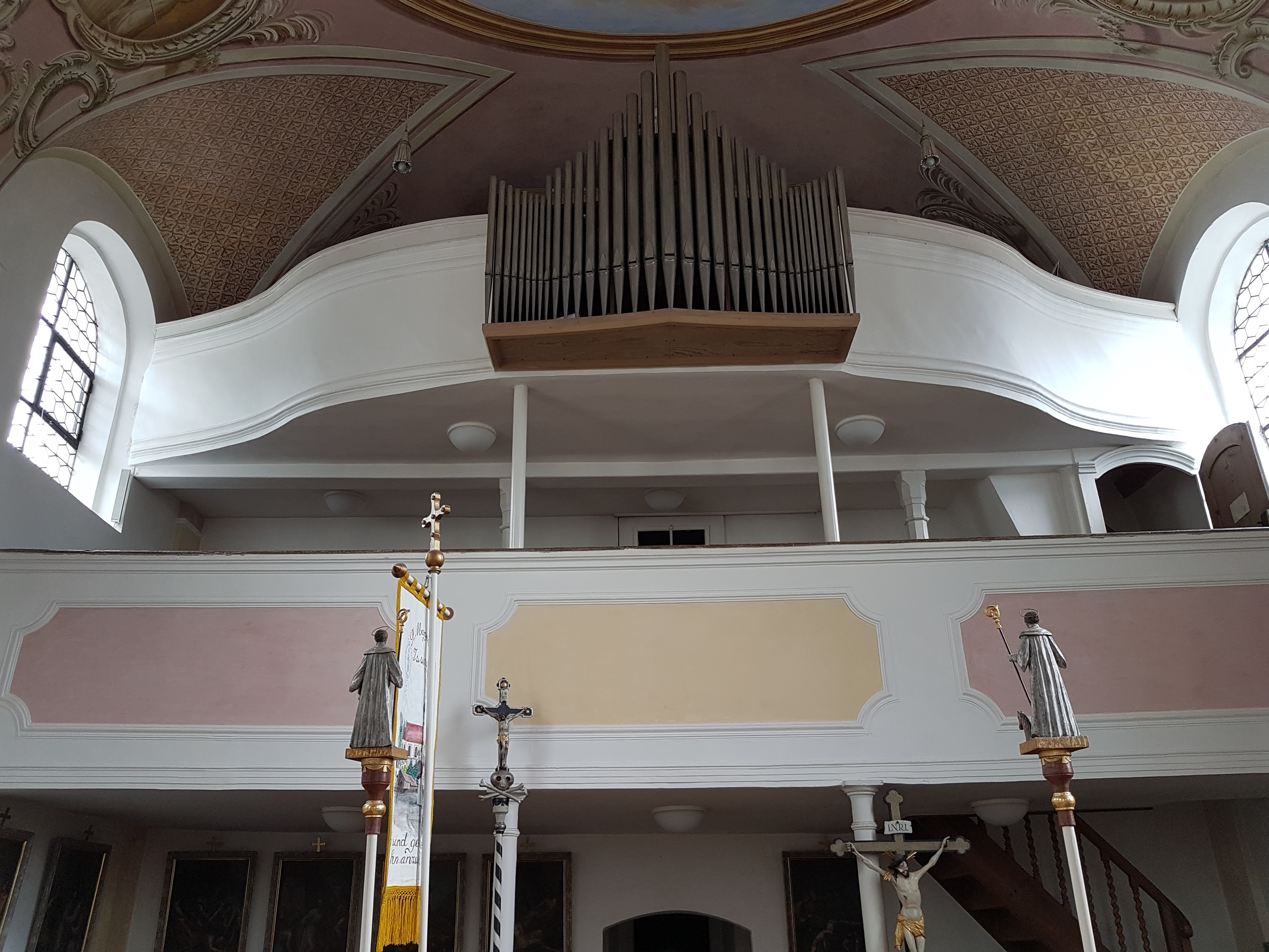 Issing (Vilgertshofen), Pfarrkirche St. Margaretha, Blick hinauf zu den beiden Emporen.